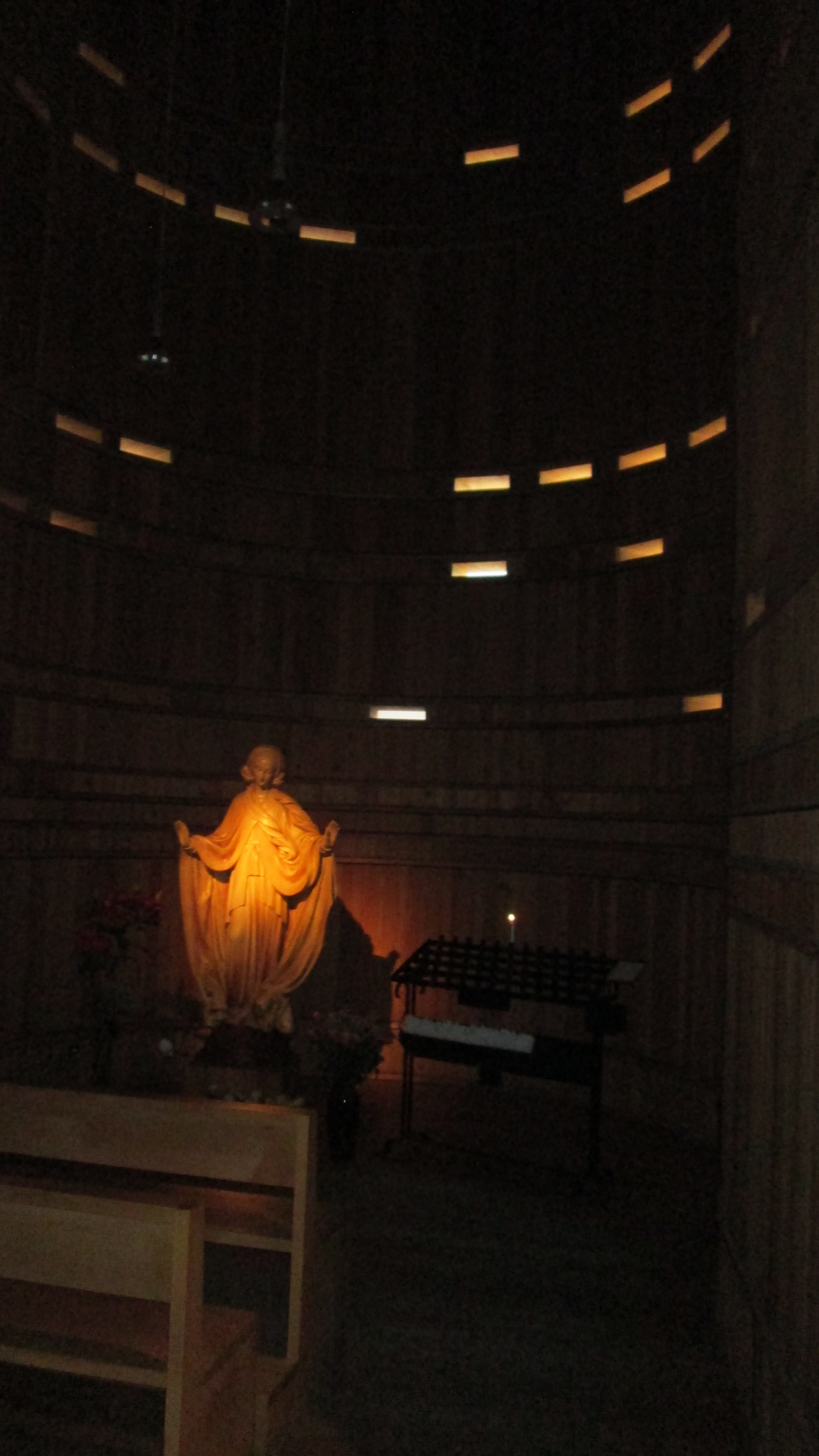 Inneres der St.-Canisius-Kirche (Berlin-Charlottenburg) - Marienkapelle mit Madonna von Otto Moroder